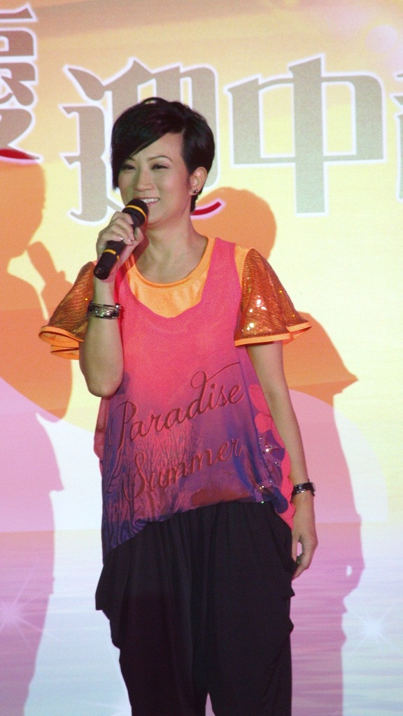 中文（香港）: 唐韋琪的樣子